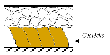 Schnëtt duerch eng fréier Strooss mat Gestécks. Eegen Aarbecht op Basis vun Datei:Packlage.png.